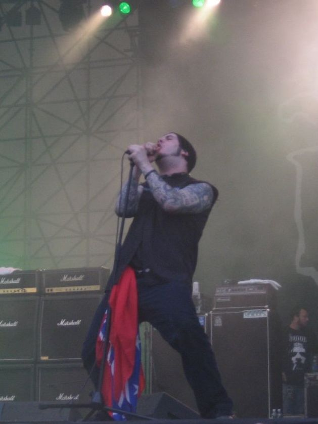 Phil Anselmo dal vivo con i Down al Gods Of Metal 2006